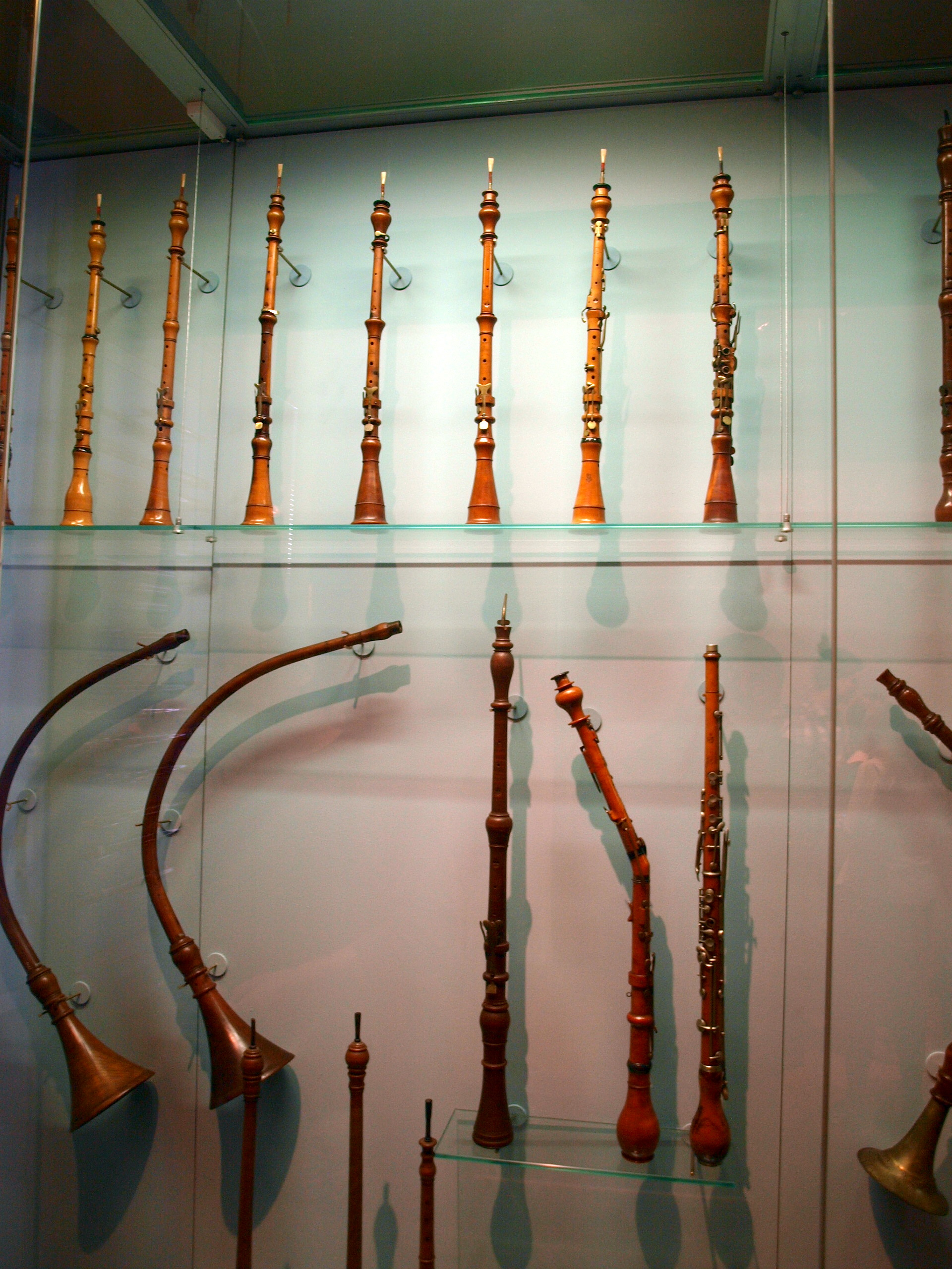 Aerofony, České muzeum hudby